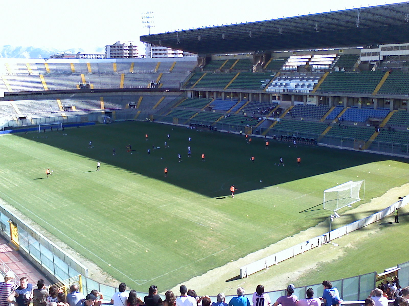 Stadio Renzo Barbera interno giorno